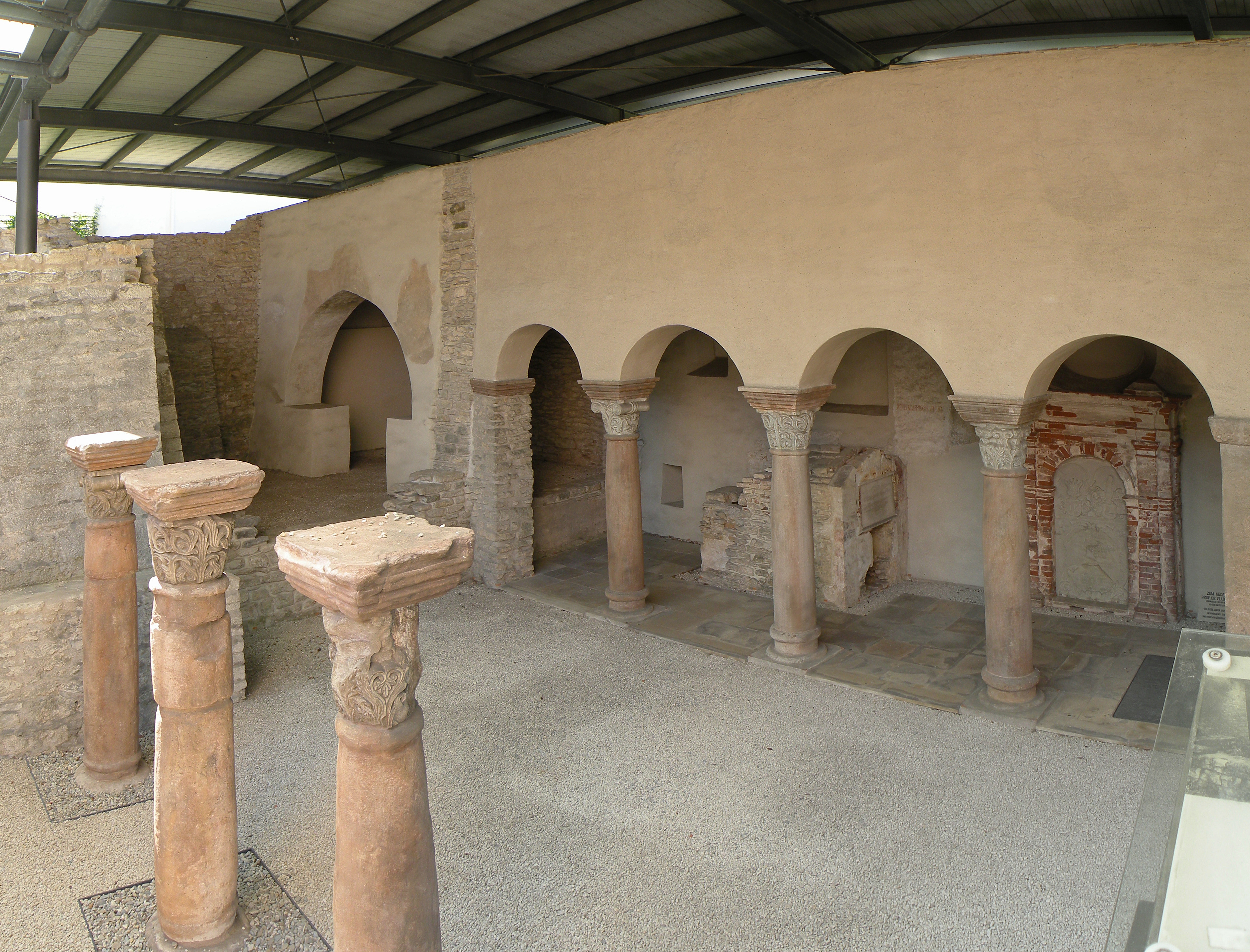 Solo_basilika.Sollnhofen